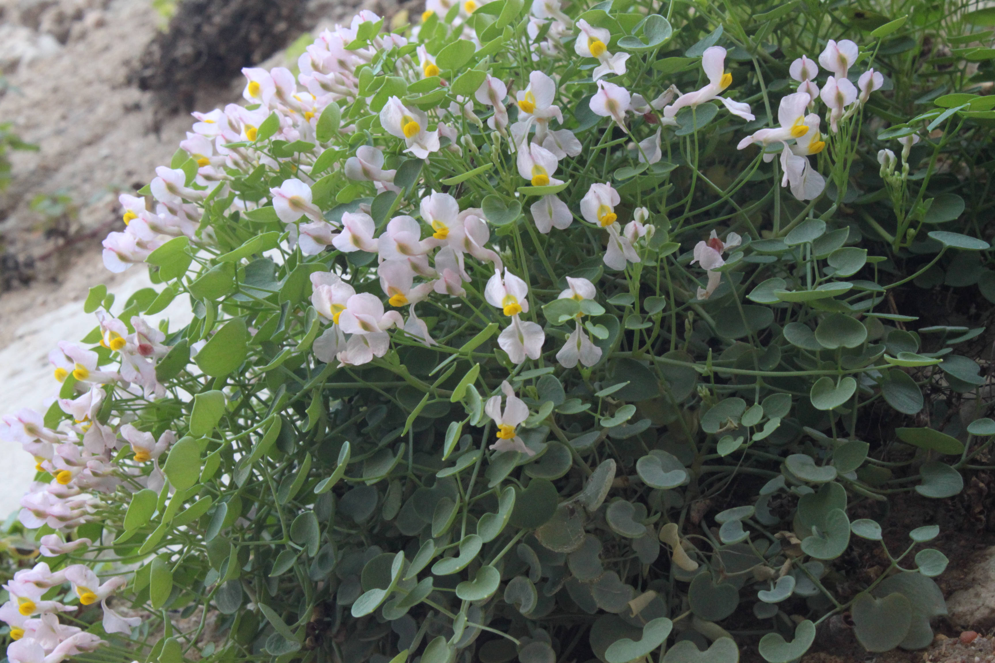 Sarcocapnos saetabensis, pie de planta localizado en el Castillo de Xátiva (Valencia).